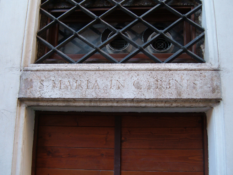 L'architrave sopra la porta d'entrata che indica: S. Maria in Carinis.